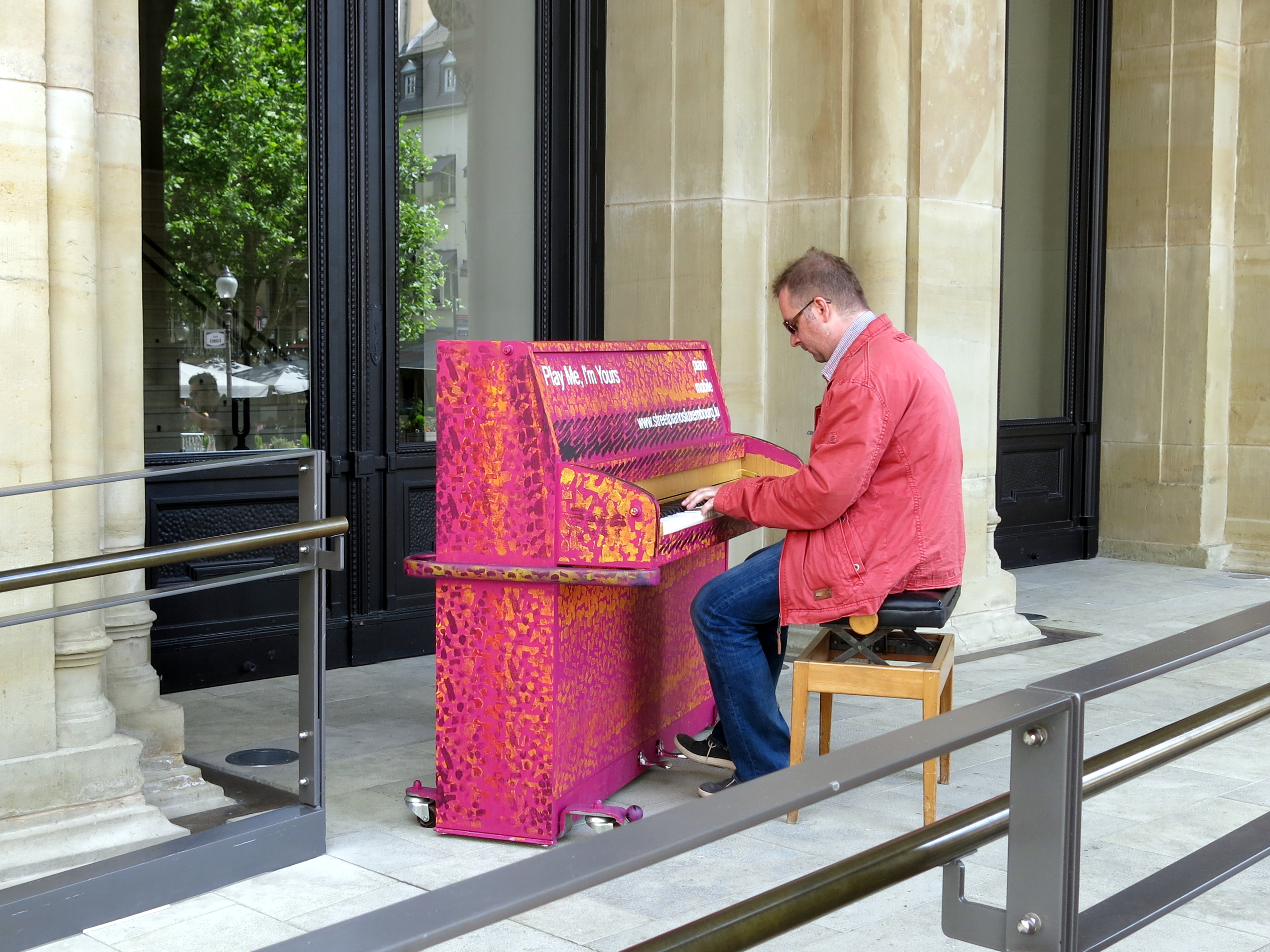 Play Me, I'm Yours beim Zerkel.